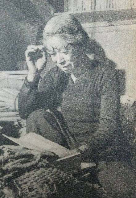 市川房枝